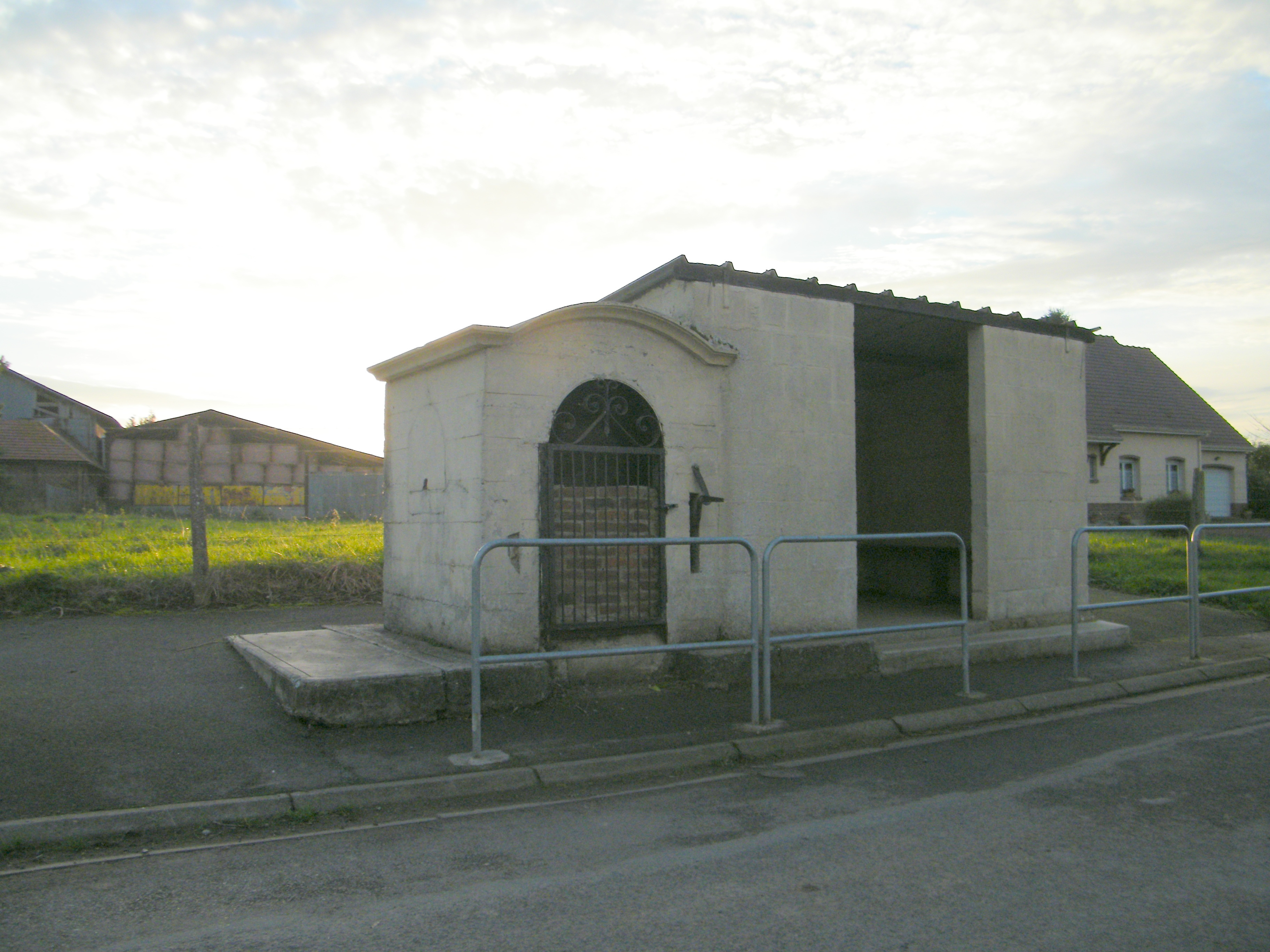 Puits (porte murée) et abribus scolaire pour les élèves du regroupement pédagogique concentré.